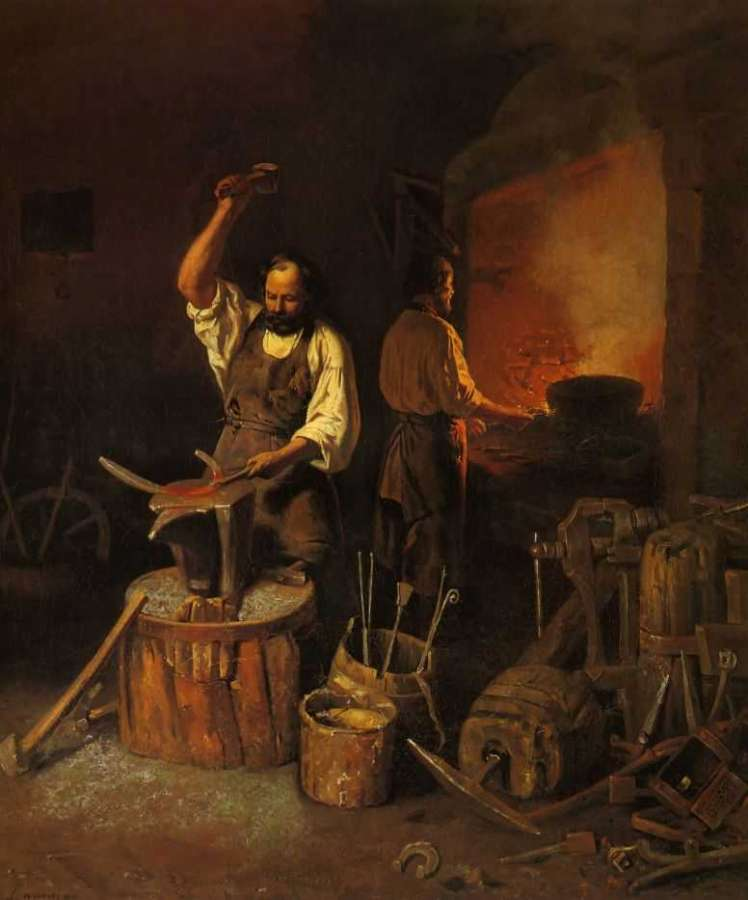 Плахов Лавр Кузьмич. Кузница. 1845